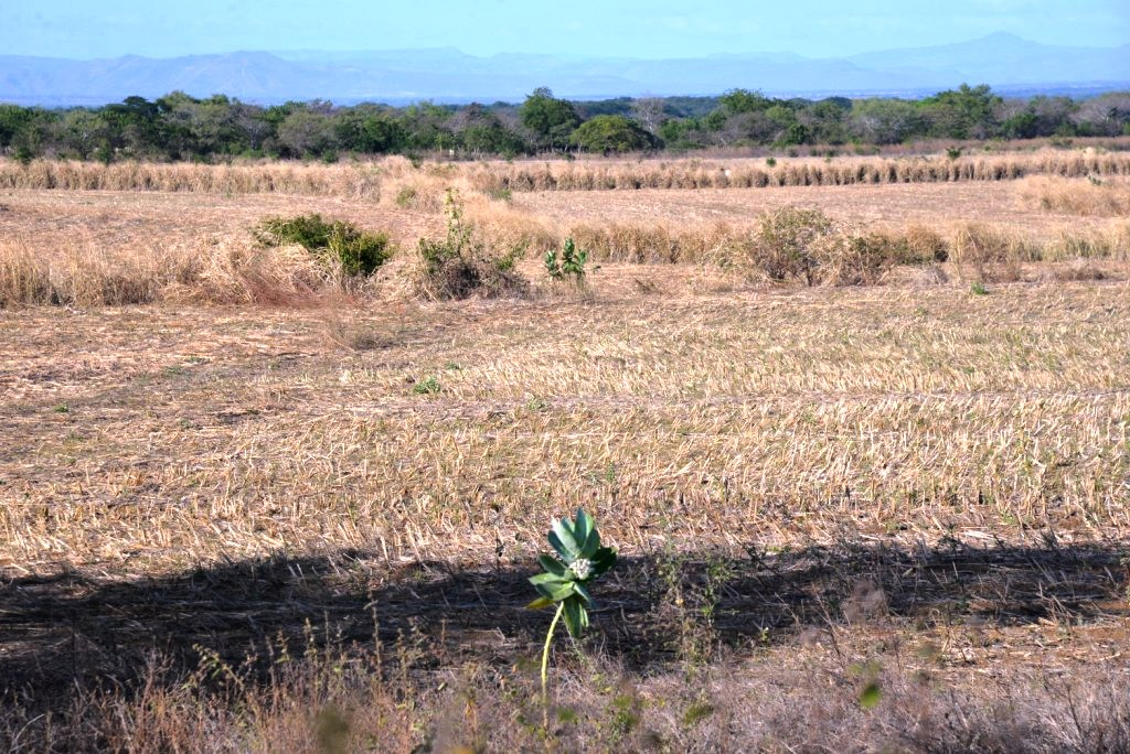 Campo en el municipio de Tisma, entre Tisma y Zambrano.